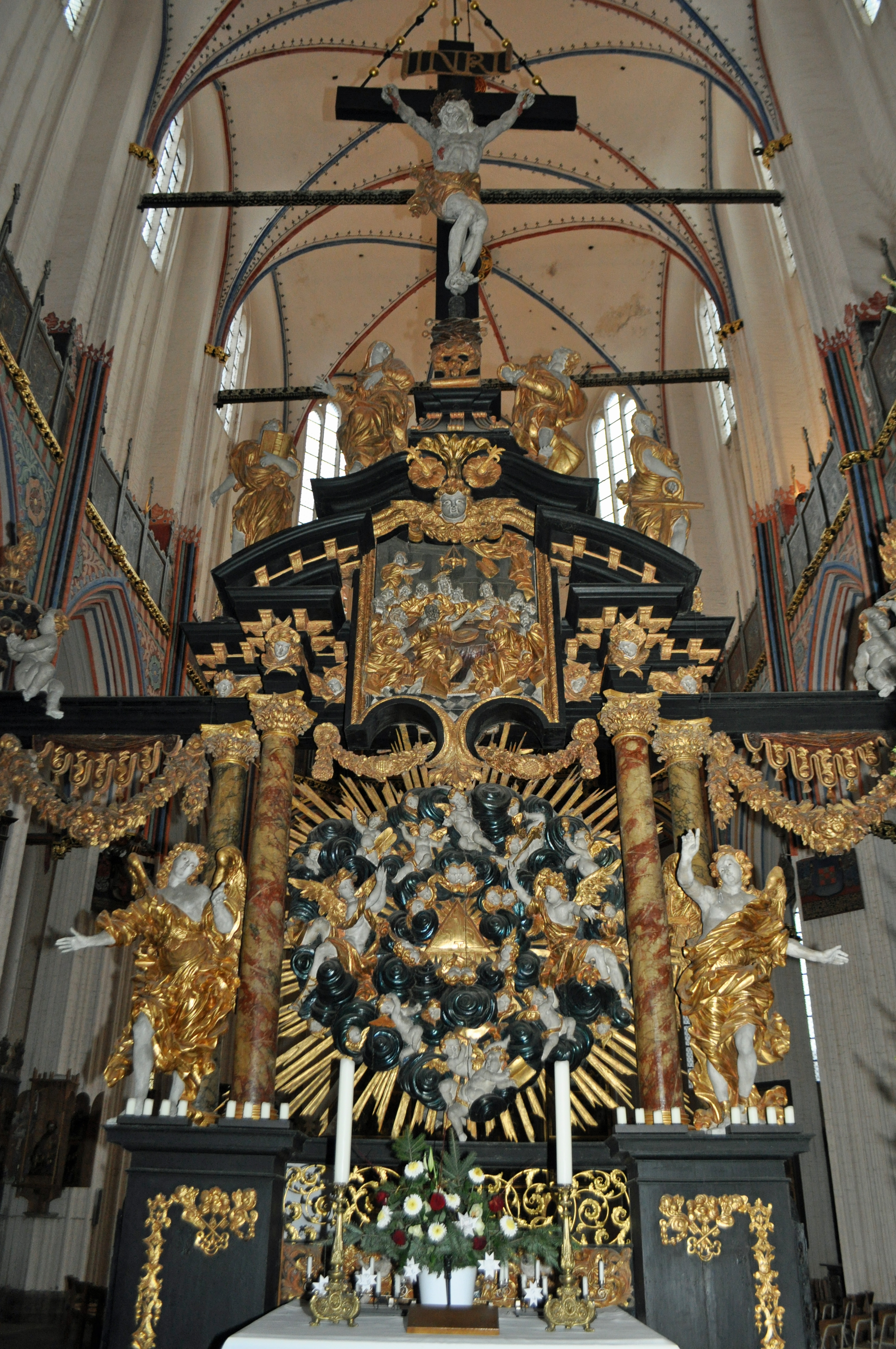 Stralsund, Nikolaikirche, Hauptaltar von Westen (2012-12-29), by Klugschnacker in Wikipedia